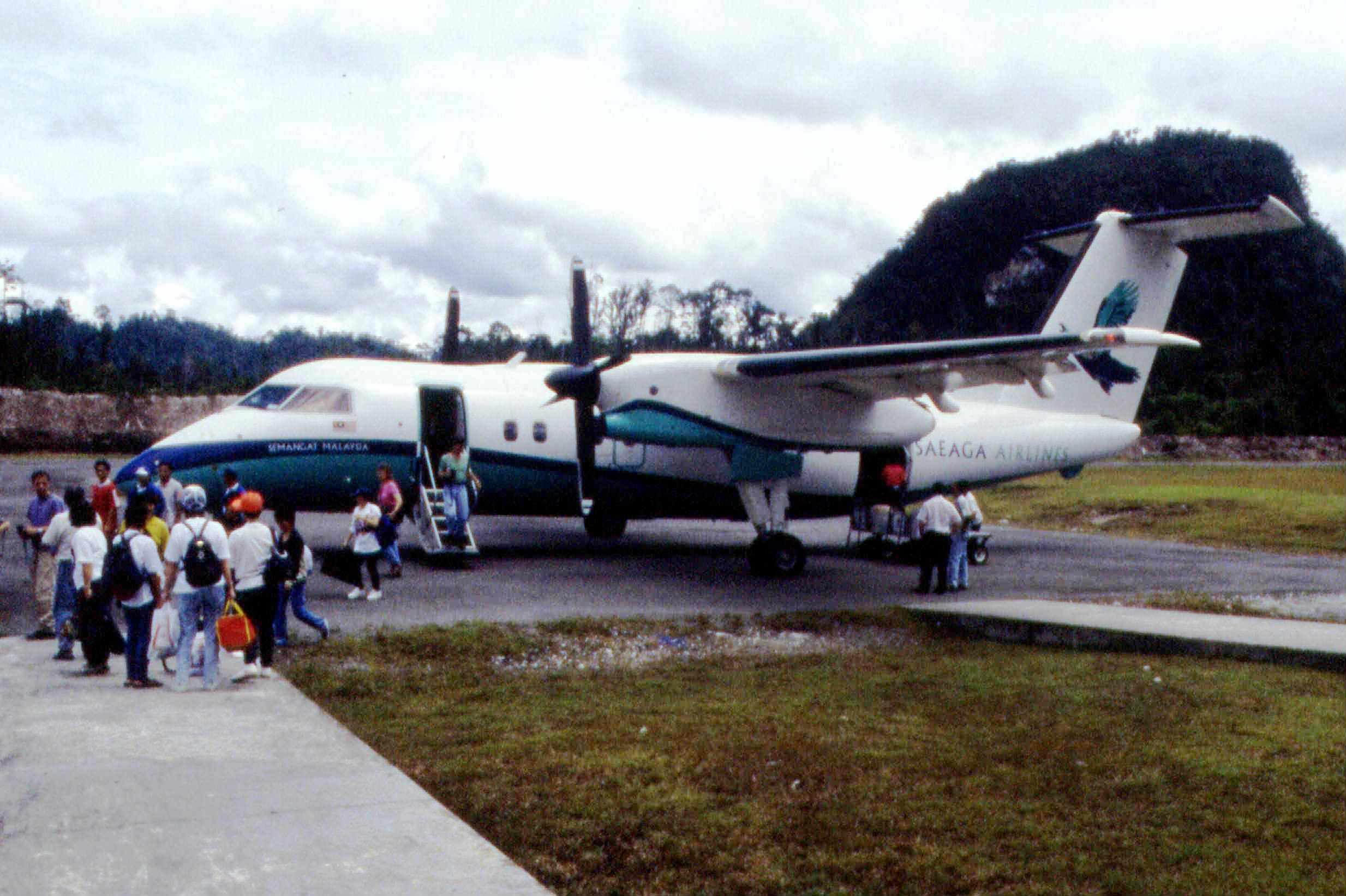 Gunung-Mulu-Nationalpark, Flugplatz